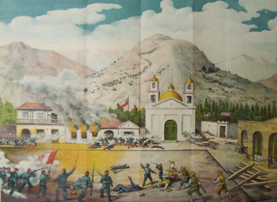 Litografia que representa la batalla de Concepción